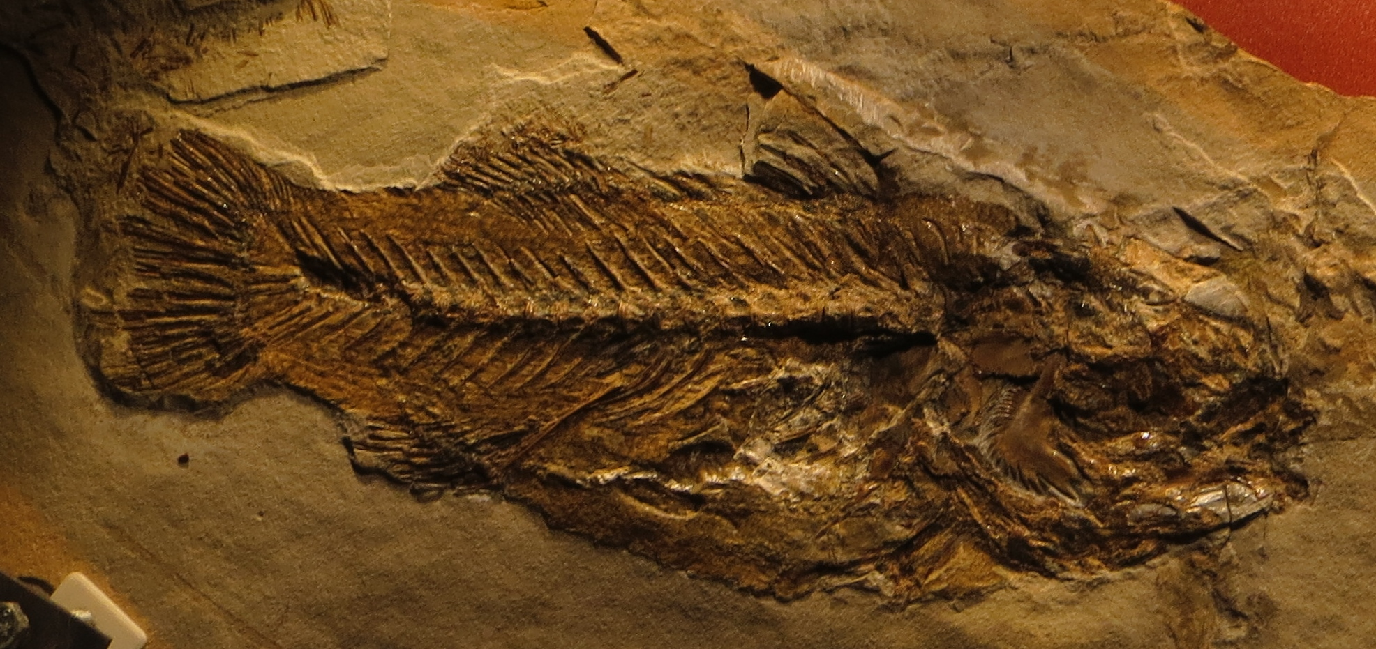 Fossil of Cyclopoma- Museo dei Fossili di Bolca